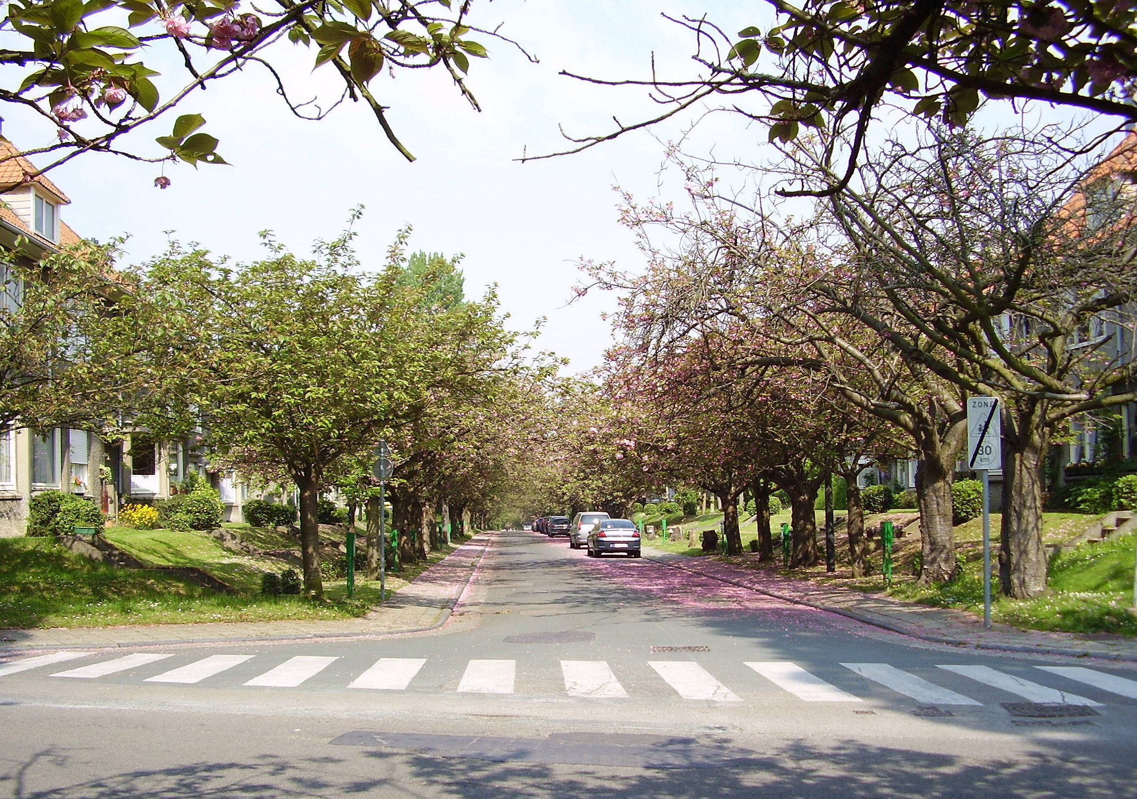 Cité-jardin Le Logis, Watermael-Boitsfort (Bruxelles)